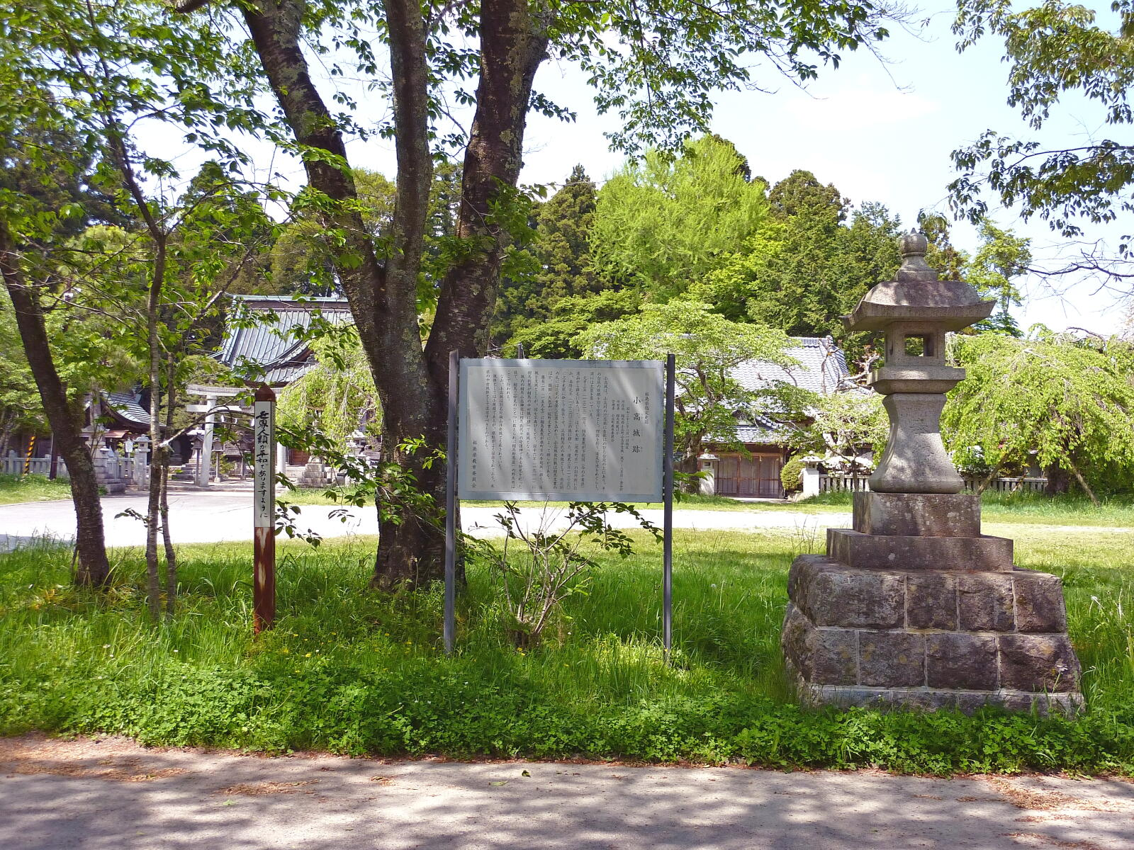 小高城跡